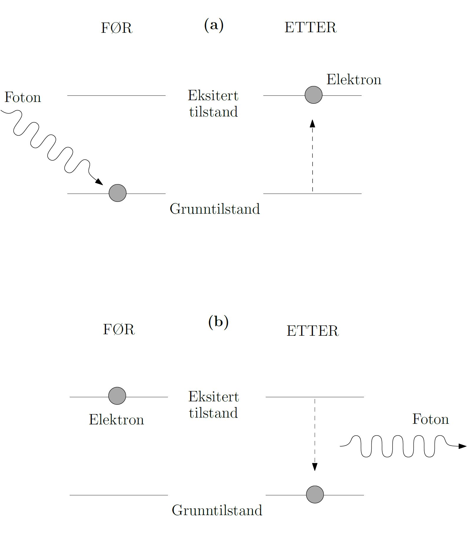 Illustrasjon av grunntilstand, eksiterte tilstander samt eksitasjonsprosessen for et elektron i et atom